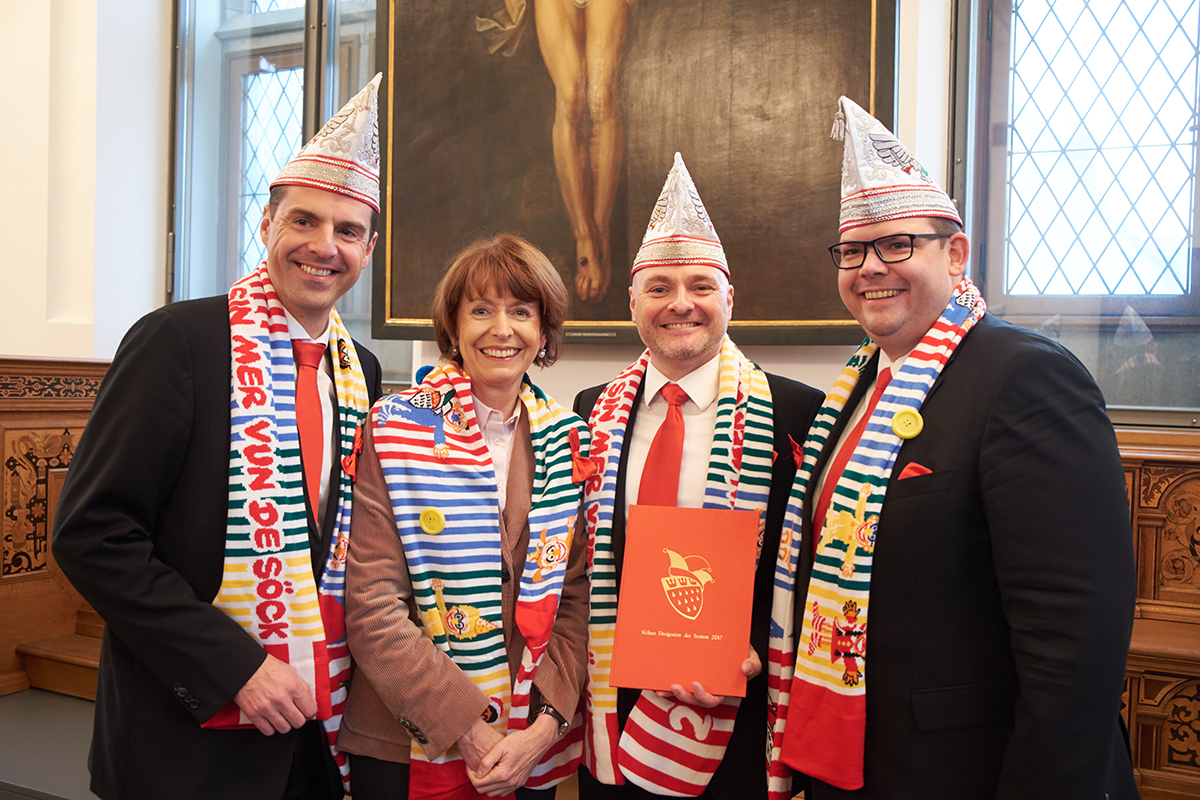 Kölner Dreigestirn der Session 2016/2017 nach der Unterzeichnung des Sessionsvertrag im Kölner Rathaus: Prinz Stefan I., Bauer Andreas und Jungfrau Stefanie. Dazwischen Henriette Reker, Oberbürgermeisterin von Köln